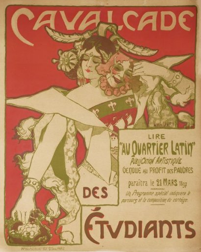 Mi-Carême des étudiants parisiens en 1897.